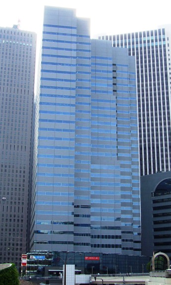 The Shinjuku Square Tower. Shinjuku, Tokyo